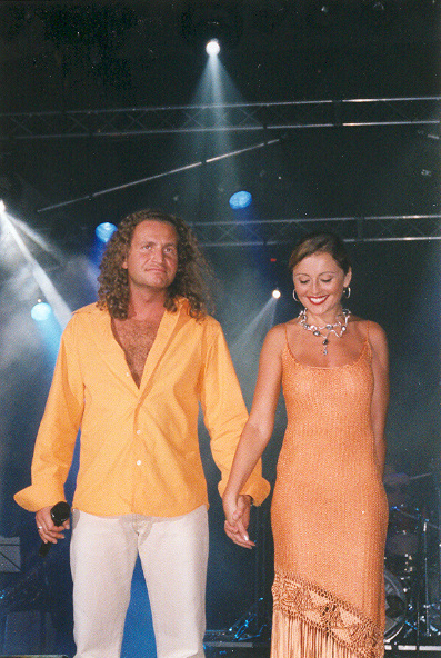 Анжелика Варум и Леонид Агутин на концерте в Тель-Авиве в 2003 году. Снимал сам.